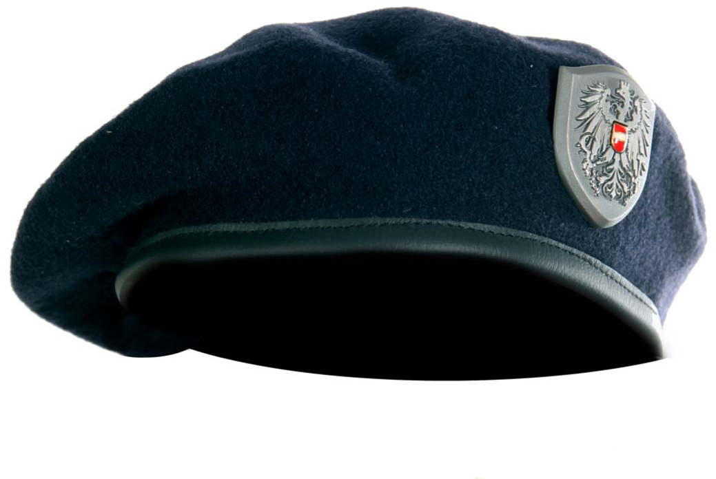 Oberbekleidungssorten der Bundespolizei und des rechtskundigen Dienstes bei den Sicherheitsbehörden Barett, dunkelblau - E2b, E2c, VB/S